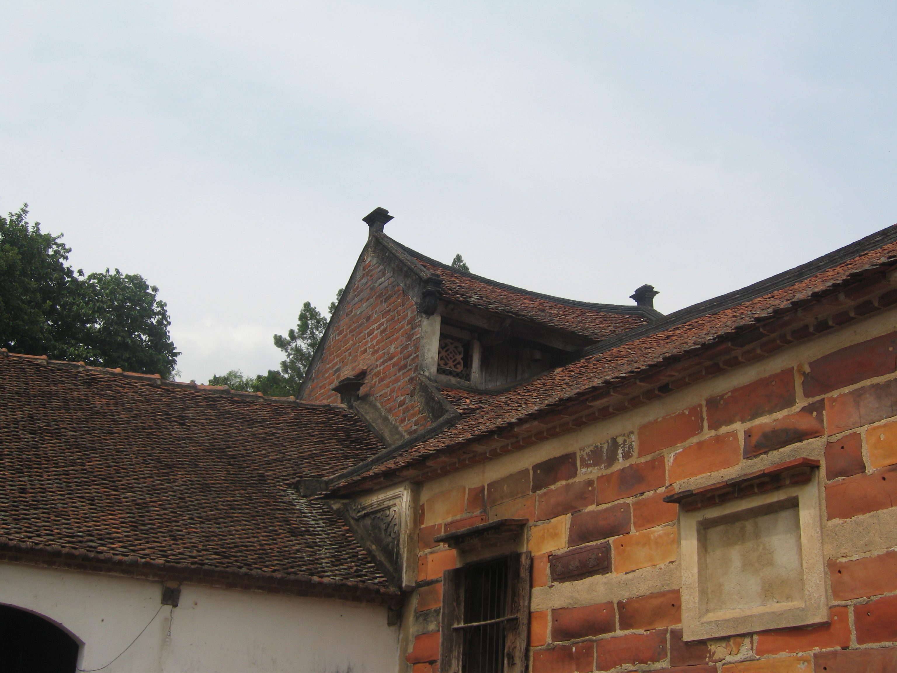 Chùa Bổ Đà, hình chụp bởi Thành viên:Casablanca1911